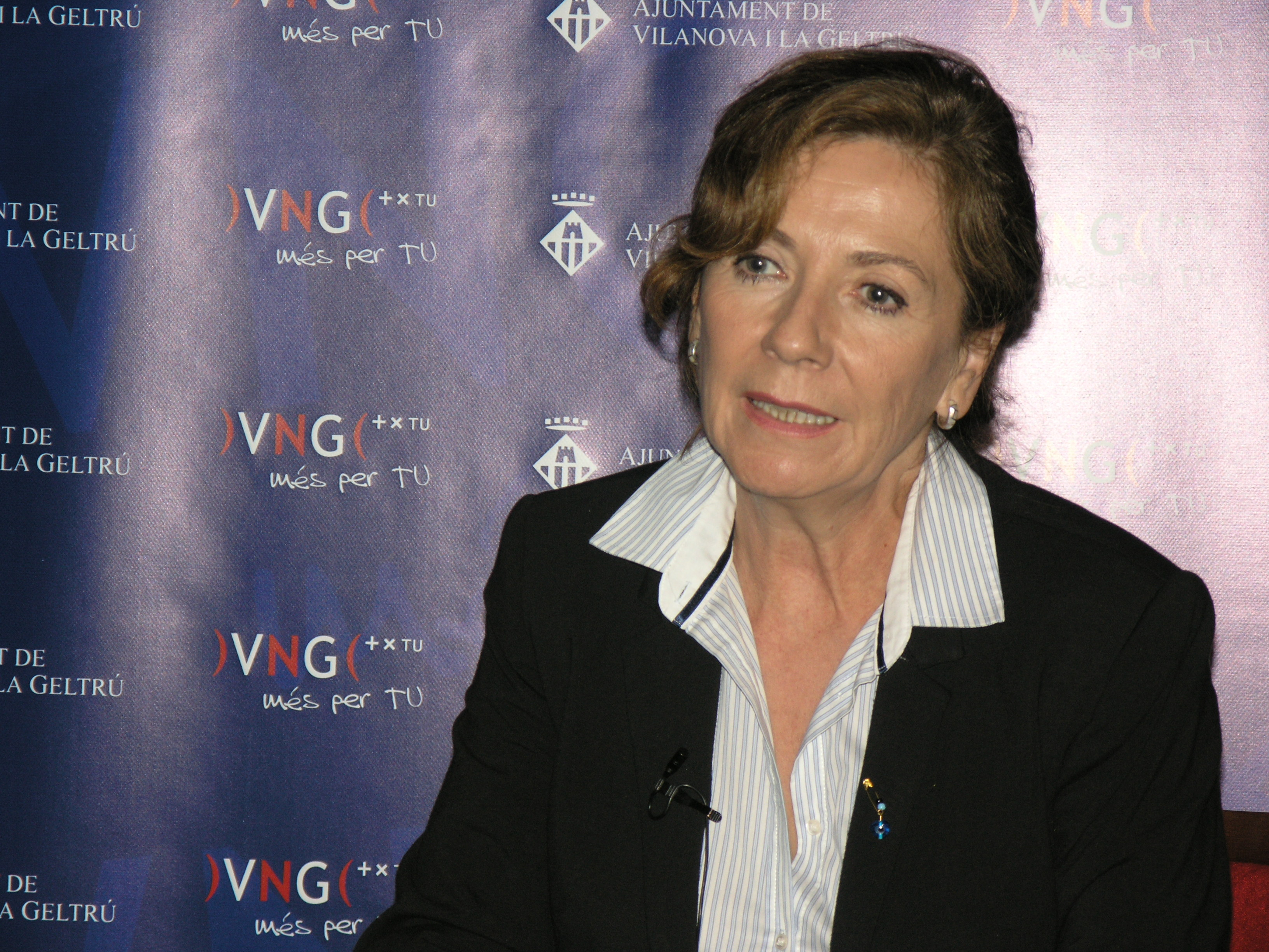 El Teatre Principal de Vilanova i la Geltrú obrirà de nou les seves portes el proper divendres 30 d'octubre amb una jornada de portes obertes. Dissabte 31 d'octubre, el teló es tornarà a aixecar per acollir la representació de l'obra "Brams" de Toni Albà i Sergi López que, amb motiu de la reobertura del teatre, es retroben de nou. La programació del diumenge inclou també la representació de l'espectacle “El secret a l'armari” de la companyia vilanovina l'Estaquirot Teatre. La presentació de la nova temporada ha comptat amb la presència d'alguns protagonistes, com l'actriu Rosa Novell que portarà a escena l'obra "Sin noticias de Gurb", Oriol Broggi, director de l'obra teatral "Hamlet" i Caterine Allard, director d'It Dansa.